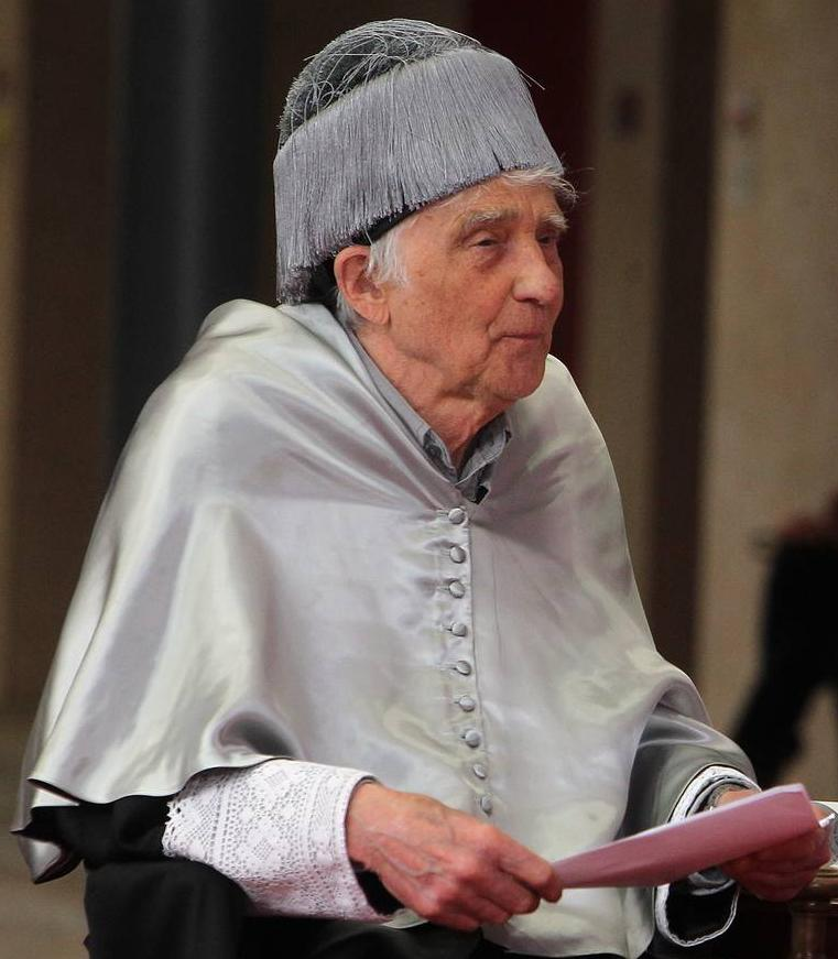 Envestidura Doctor Honoris Causa por la Universidad de Valladolid - España.